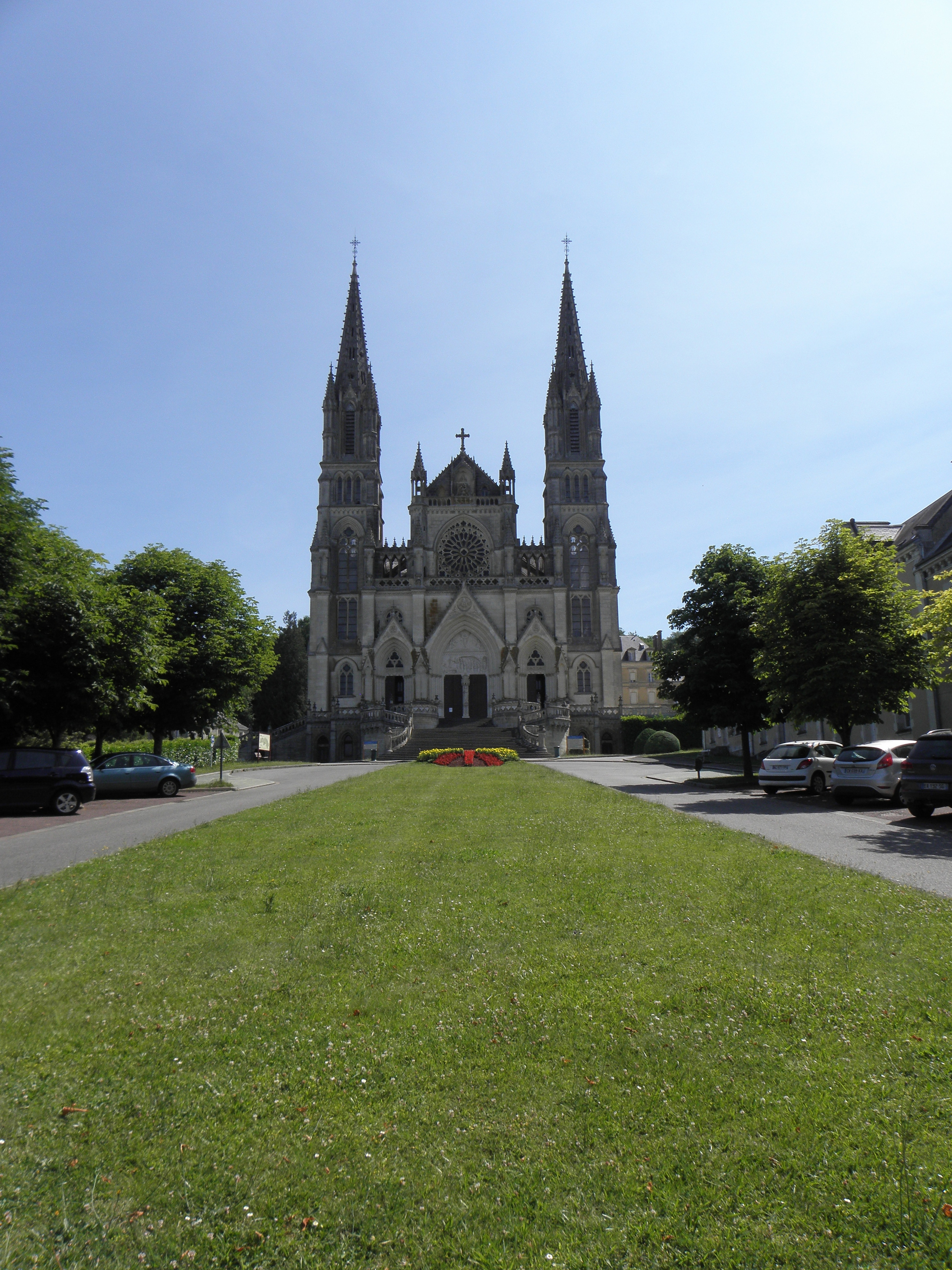 Basilique Notre-Dame de La Chapelle-Montligeon (61). Extérieur. Façade occidentale.